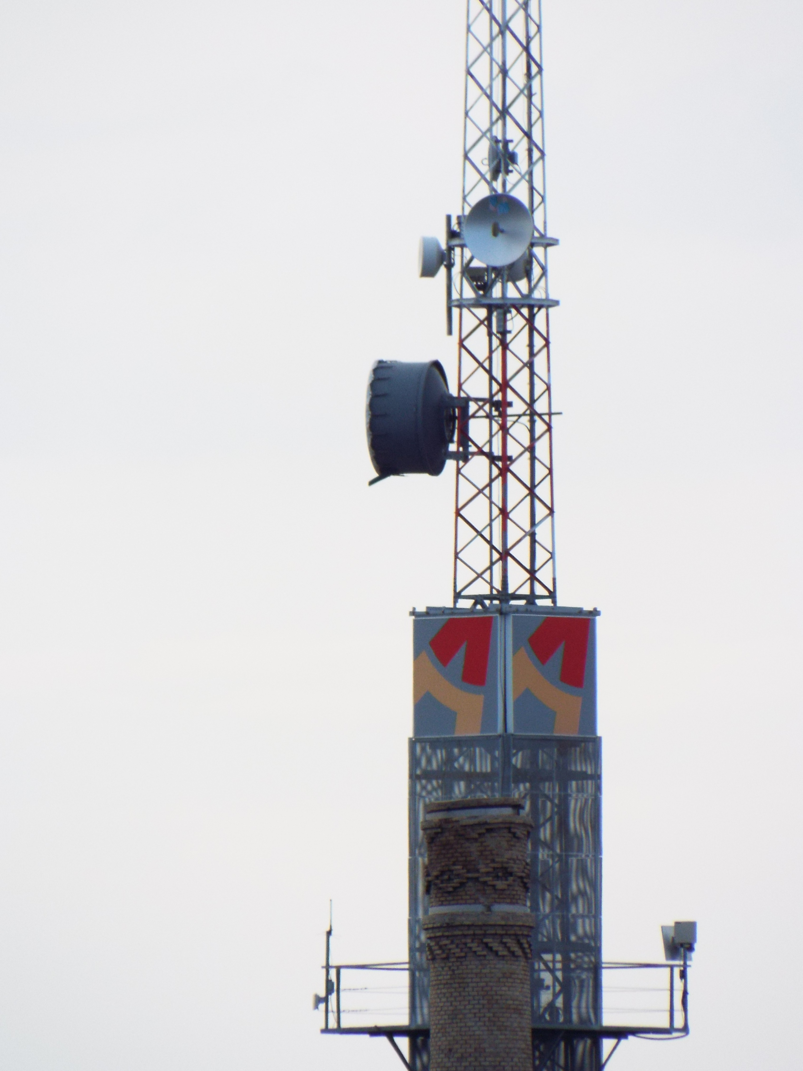 Vista de la antena de la Corporación Aragonesa de Radio y Televisión (CARTV) en su sede en Zaragoza